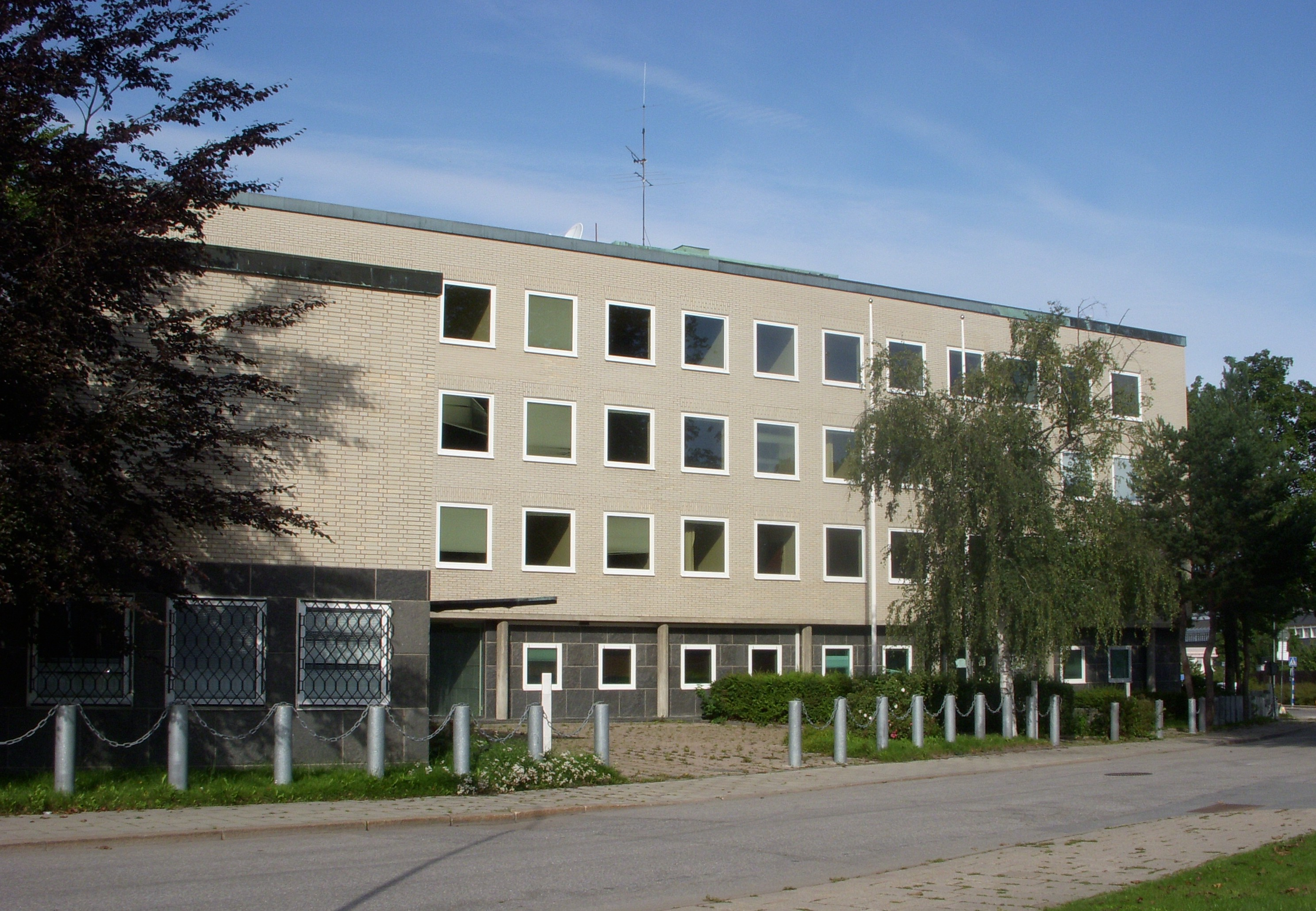 Tysklands ambassad i Stockholm